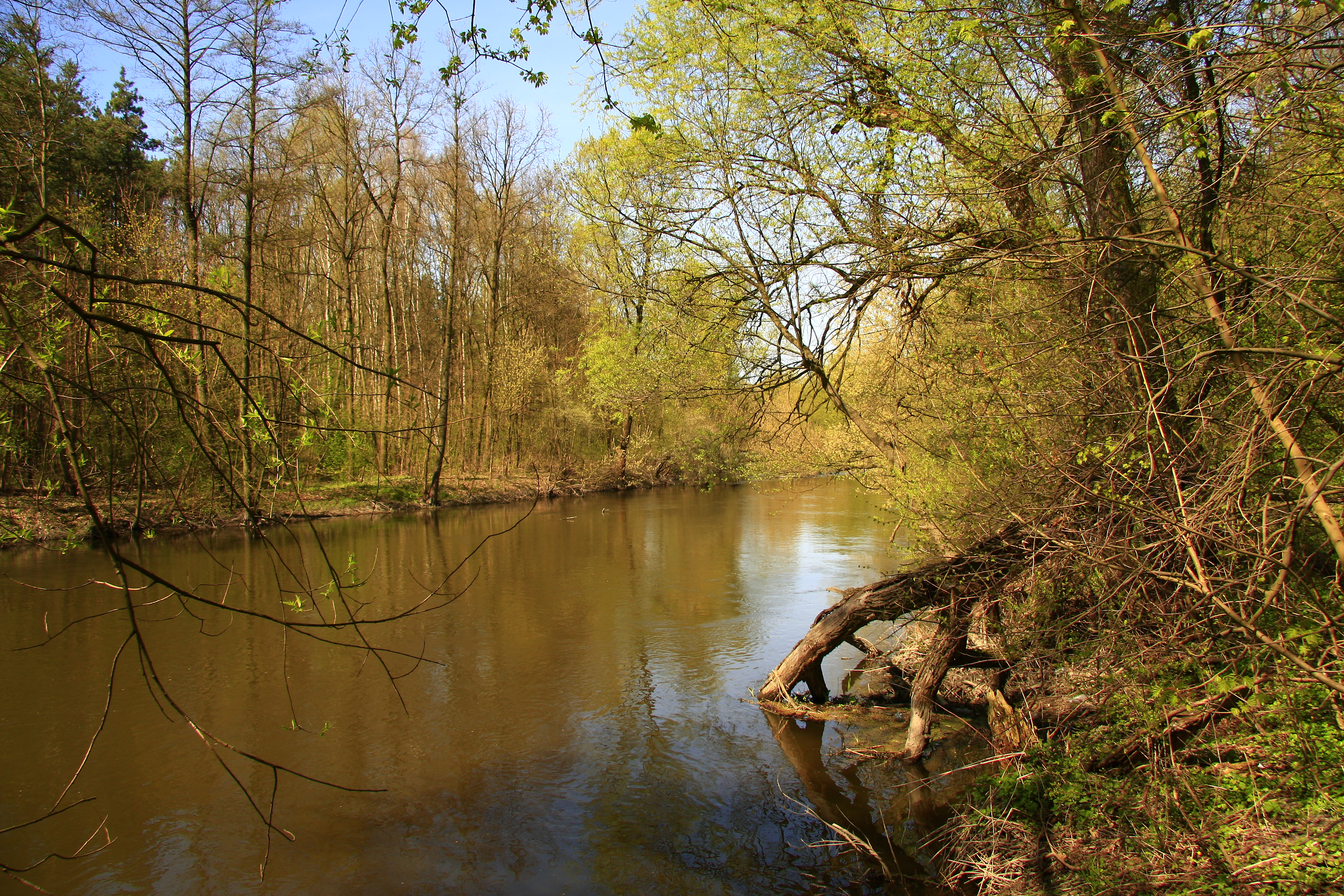 Dolina rzeki Wieprz, od Ciechanek do Witaniowa (zabytek nr rejestr. A/864 z 12.09.1983)